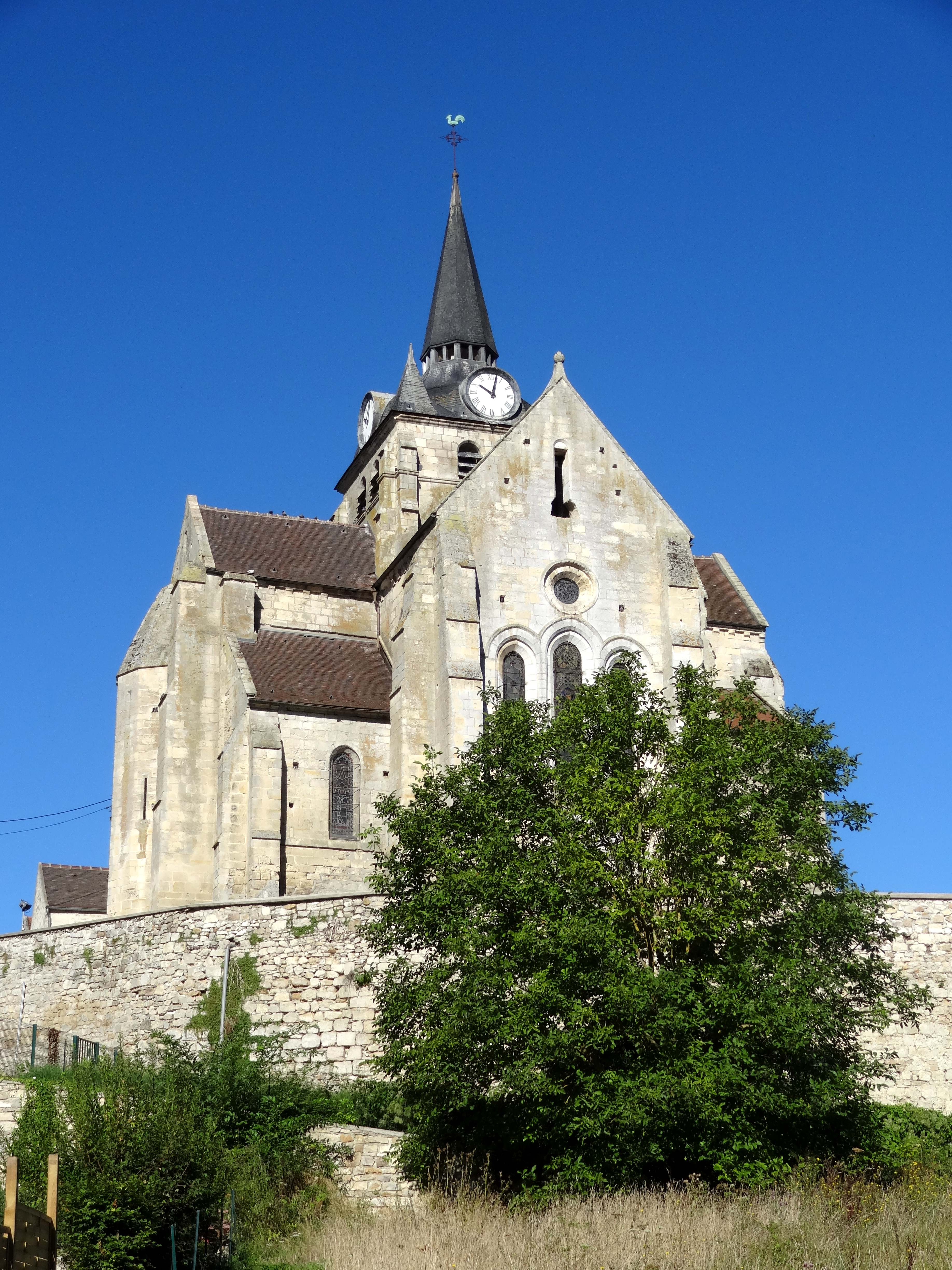 Église Saint-Martin de Mareuil-sur-Ourcq - voir titre.